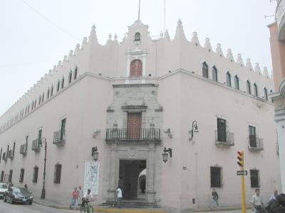 Fachada del edificio central de la Universidad Autónoma de Yucatán.